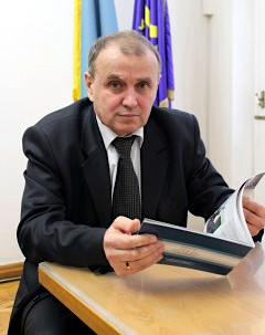 Валерій Семенець, ректор ХНУРЕ